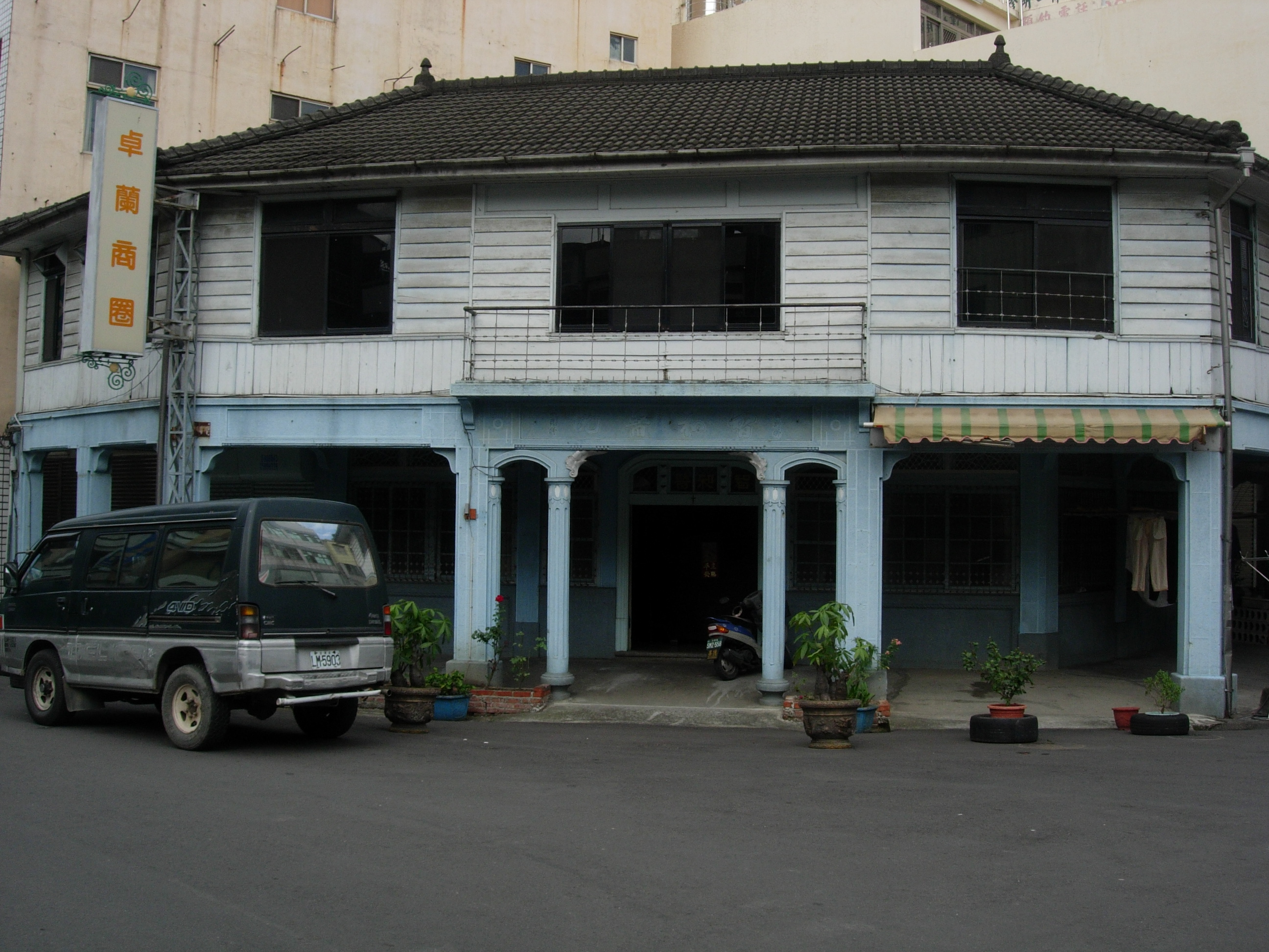 中文（台灣）: 卓蘭中山路上老式建築